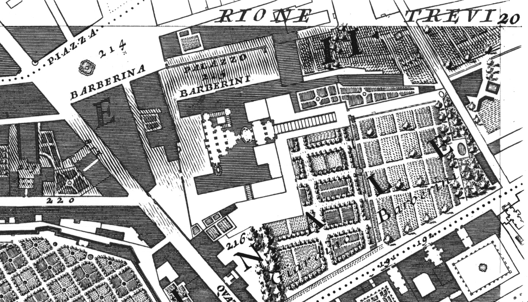 Palazzo e giardini Barberini nella Nuova Topografia di Roma di Giovanni Battista Nolli (1748).